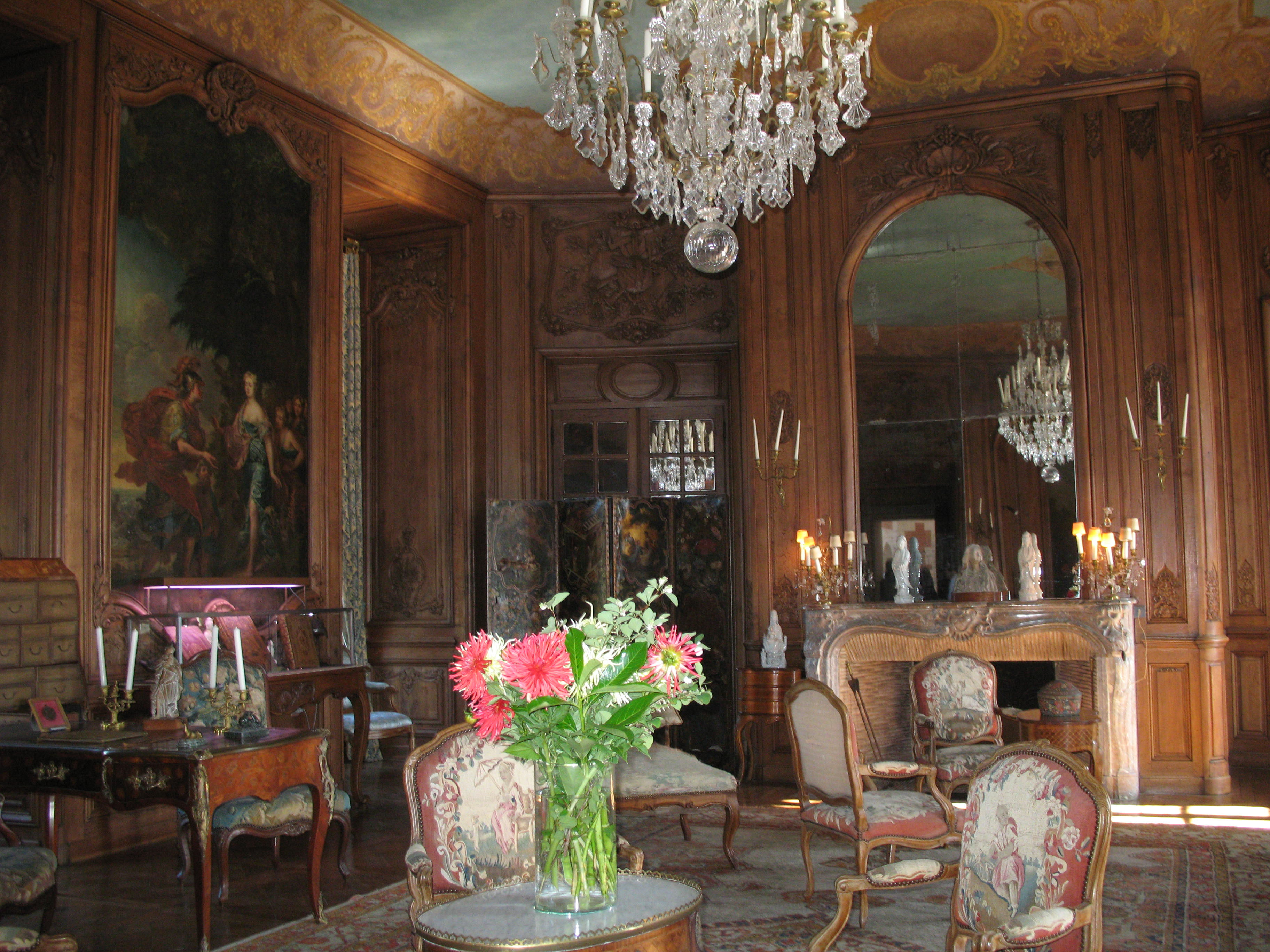 Château de Beaumesnil, à Beaumesnil dans l'Eure